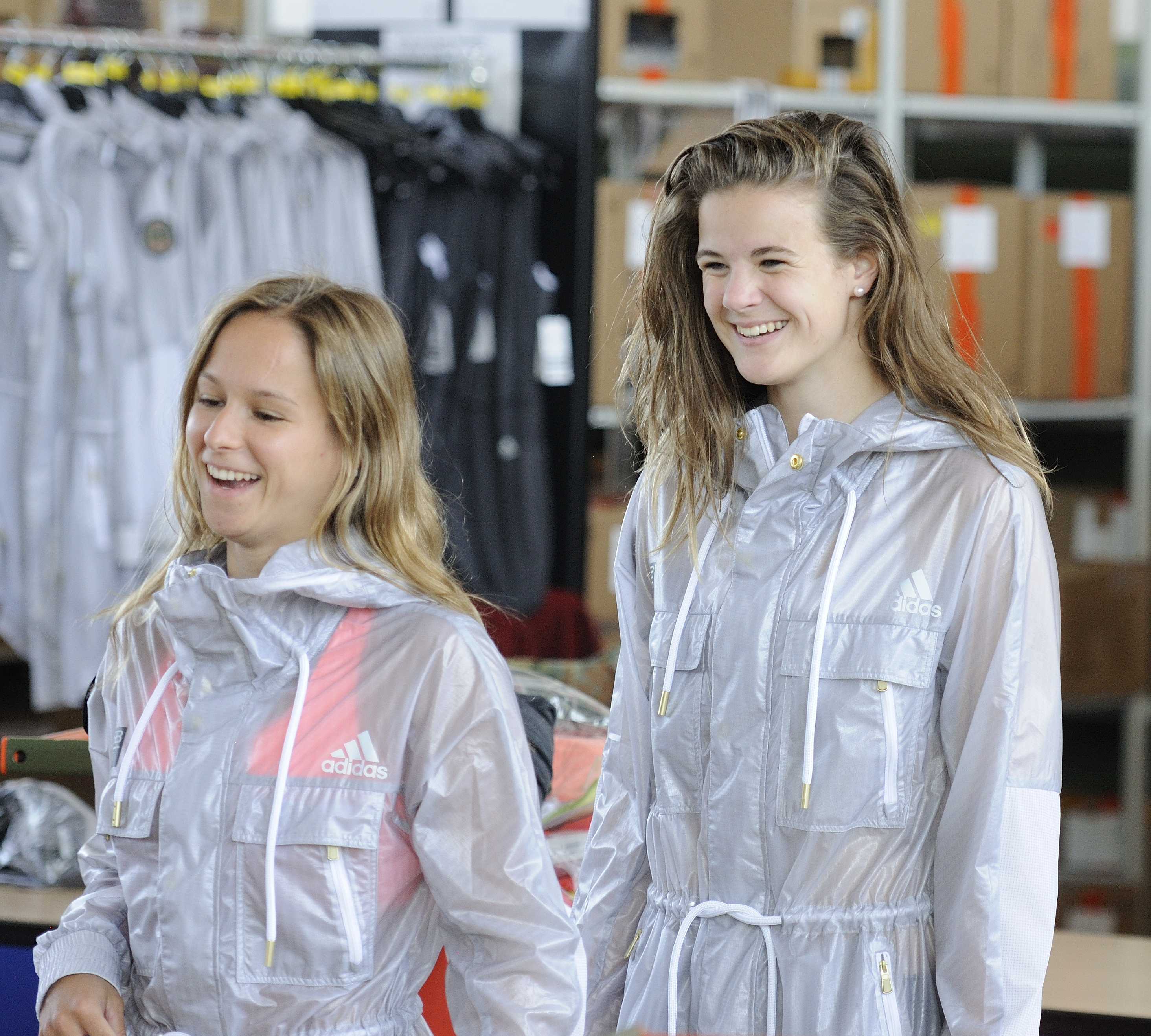 Bild aufgenommen in Hannover während der Einkleidung der deutschen Olympiamannschaft 2016. Elena Wassen und Maria Kurjo.